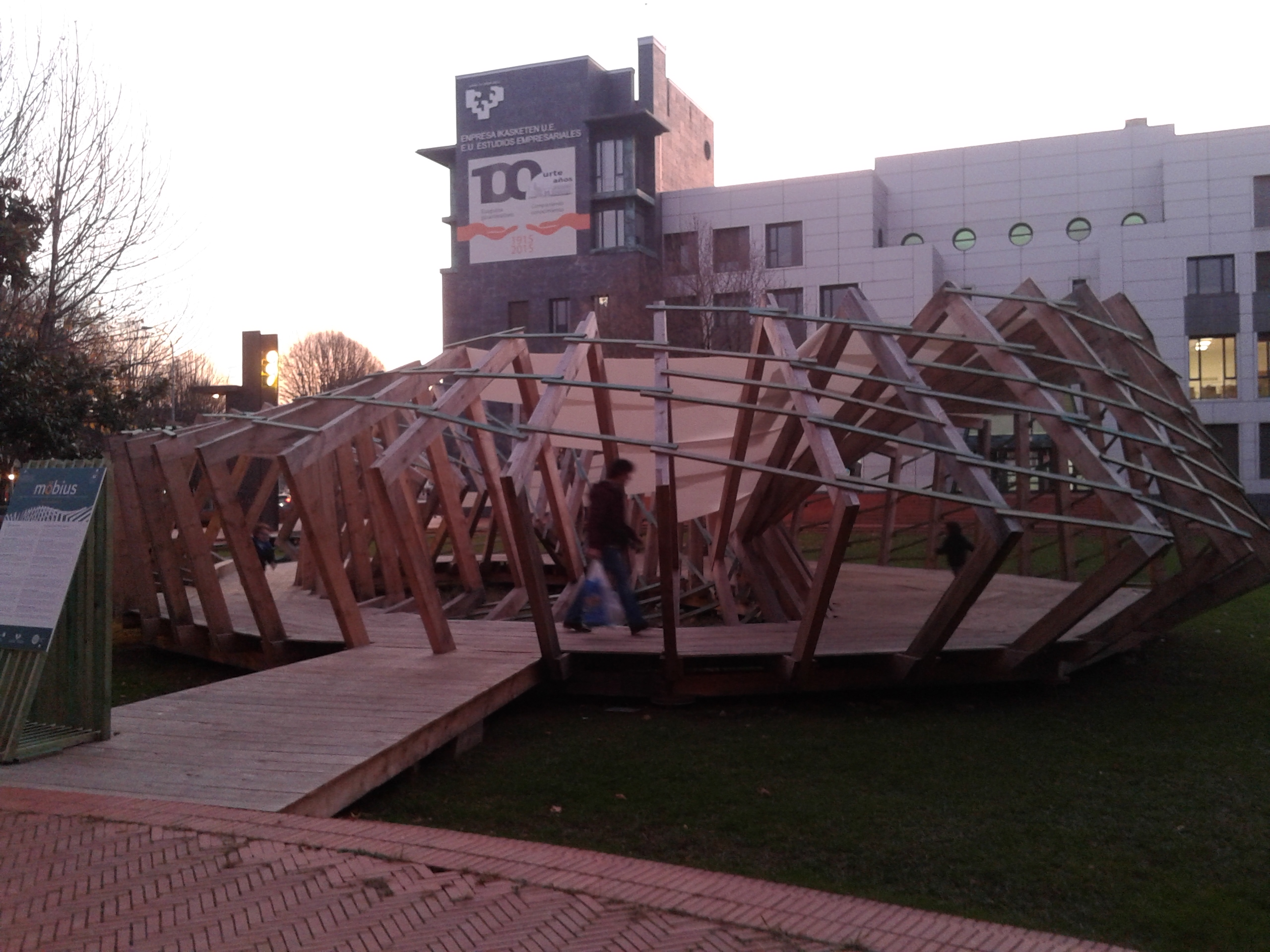 Euskal Herriko Unibertsitatean kokatutako Möbius proiektua. Donostia 2016 barruan.